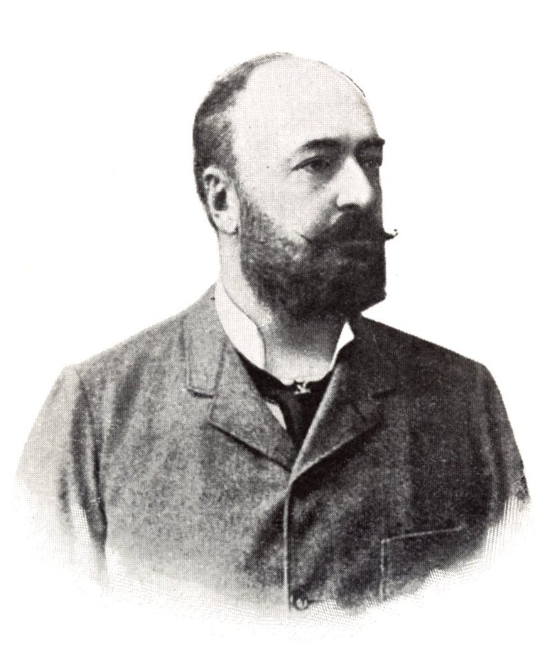 Károlyi István (1845–1907) politikus